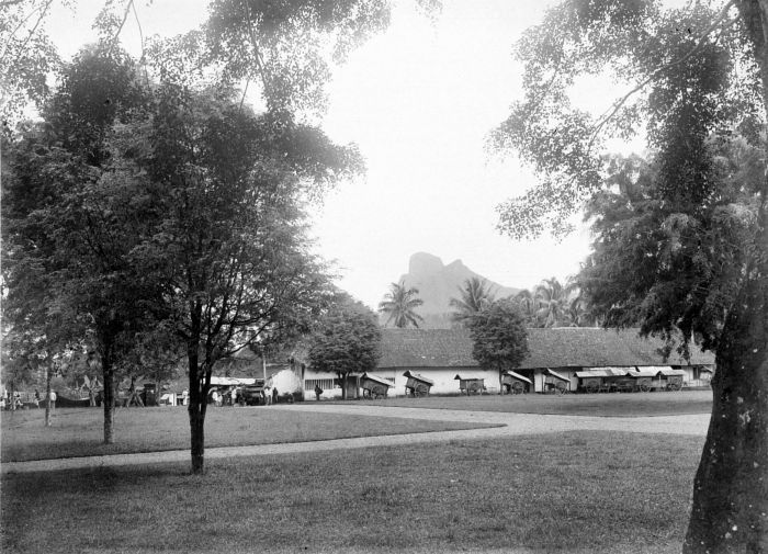 Repronegatief. Aloon-aloon te Madjalengka, West-Java